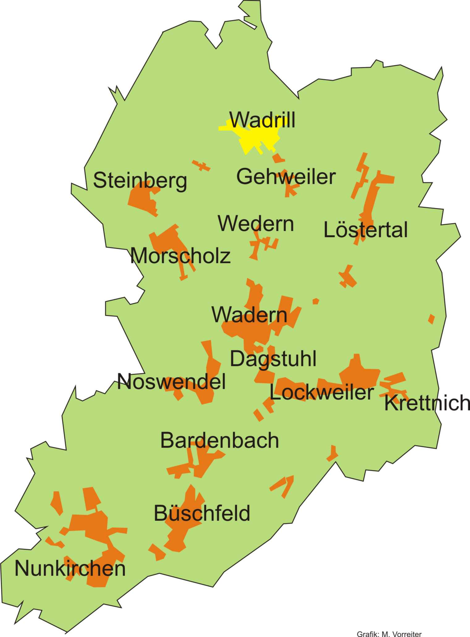 Lage des Stadtteils Wadrill innerhalb der Stadt Wadern